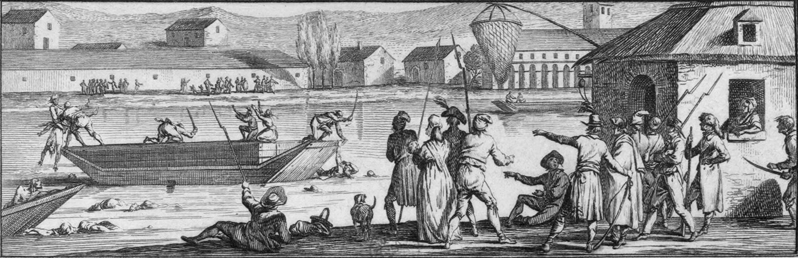 Les noyades de Nantes. Détail d'une estampe portraiturant Jean-Baptiste Carrier.